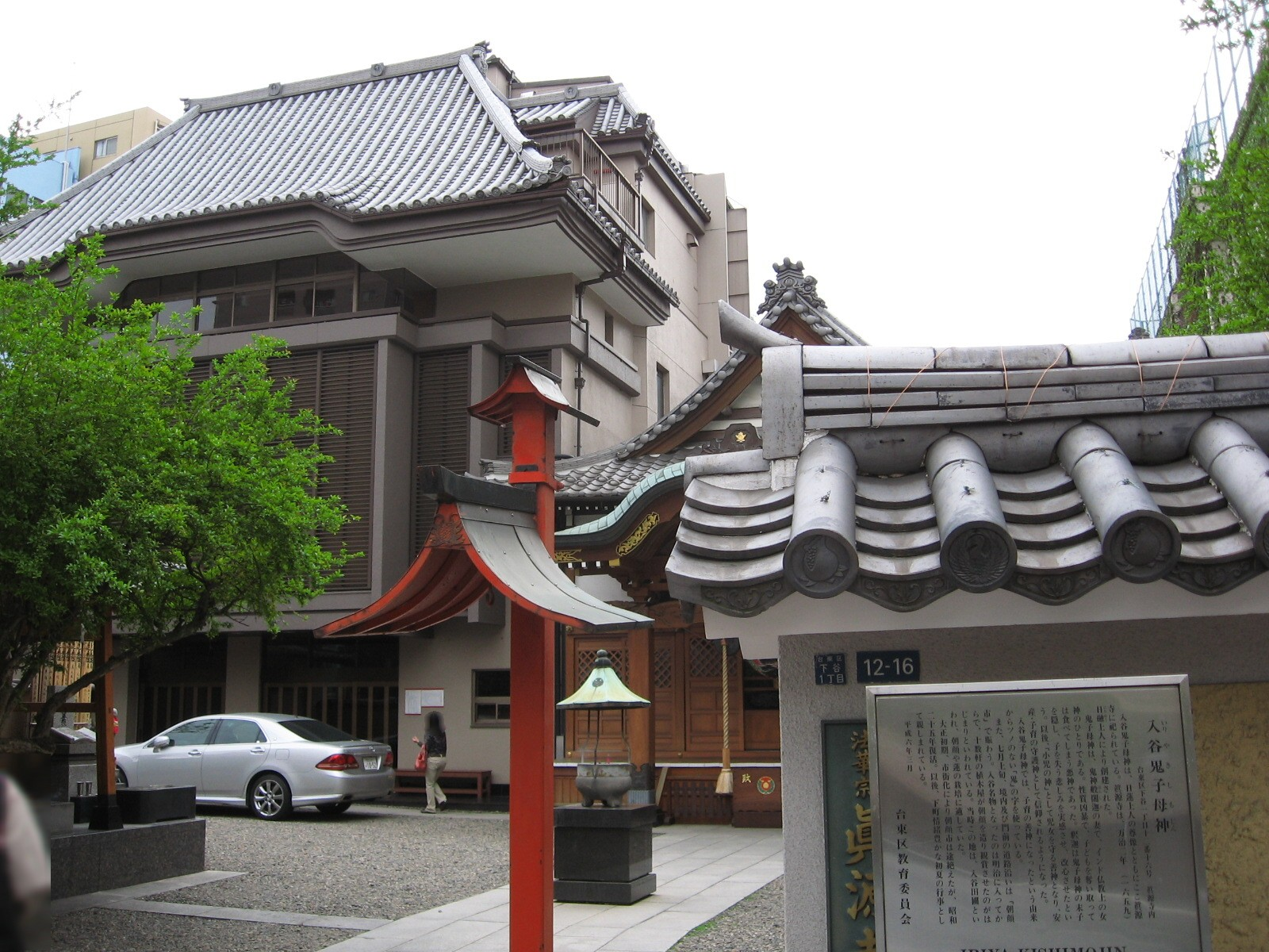 東京都台東区入谷にある真源寺（入谷鬼子母神）。